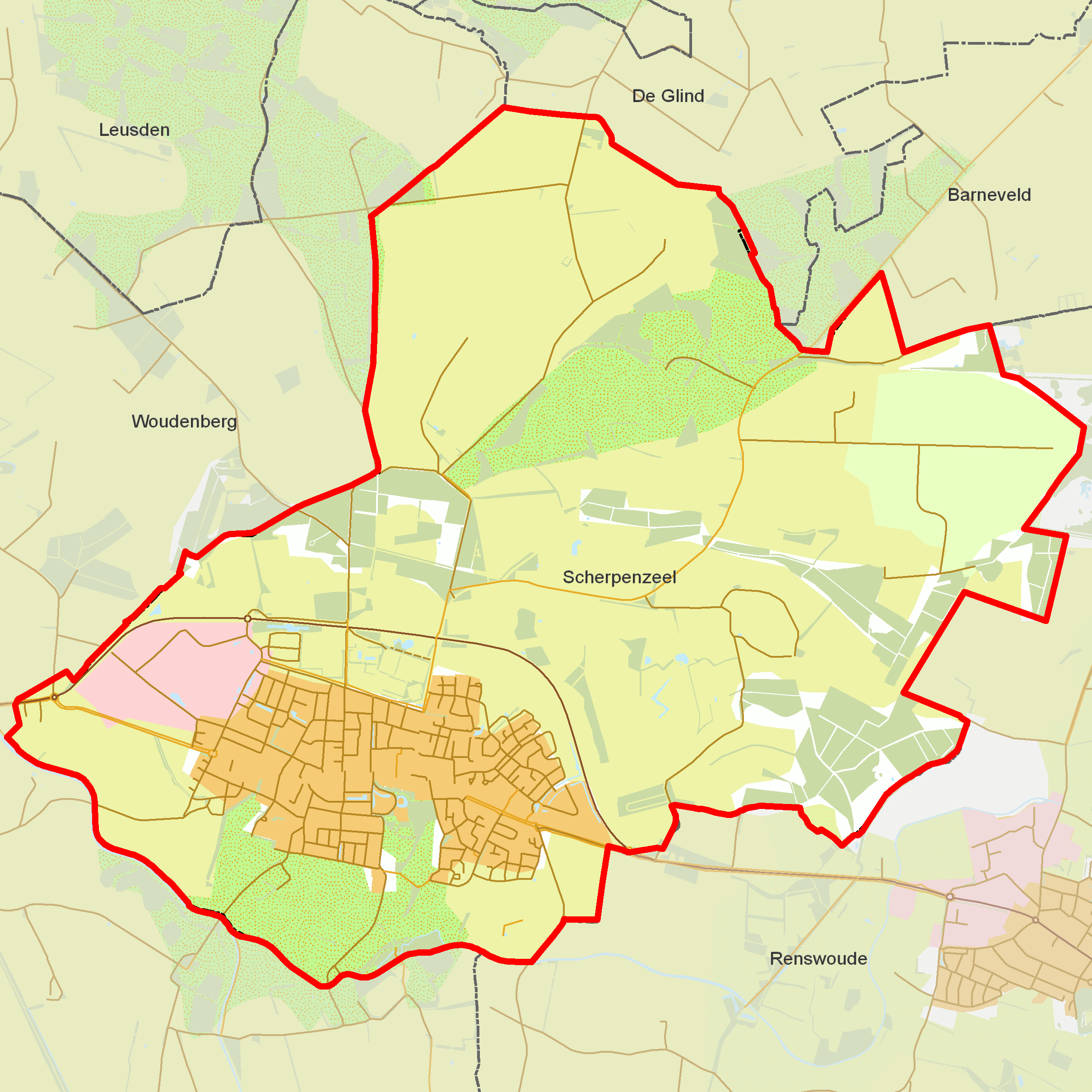 BAG woonplaatsen - Gemeente Scherpenzeel.png